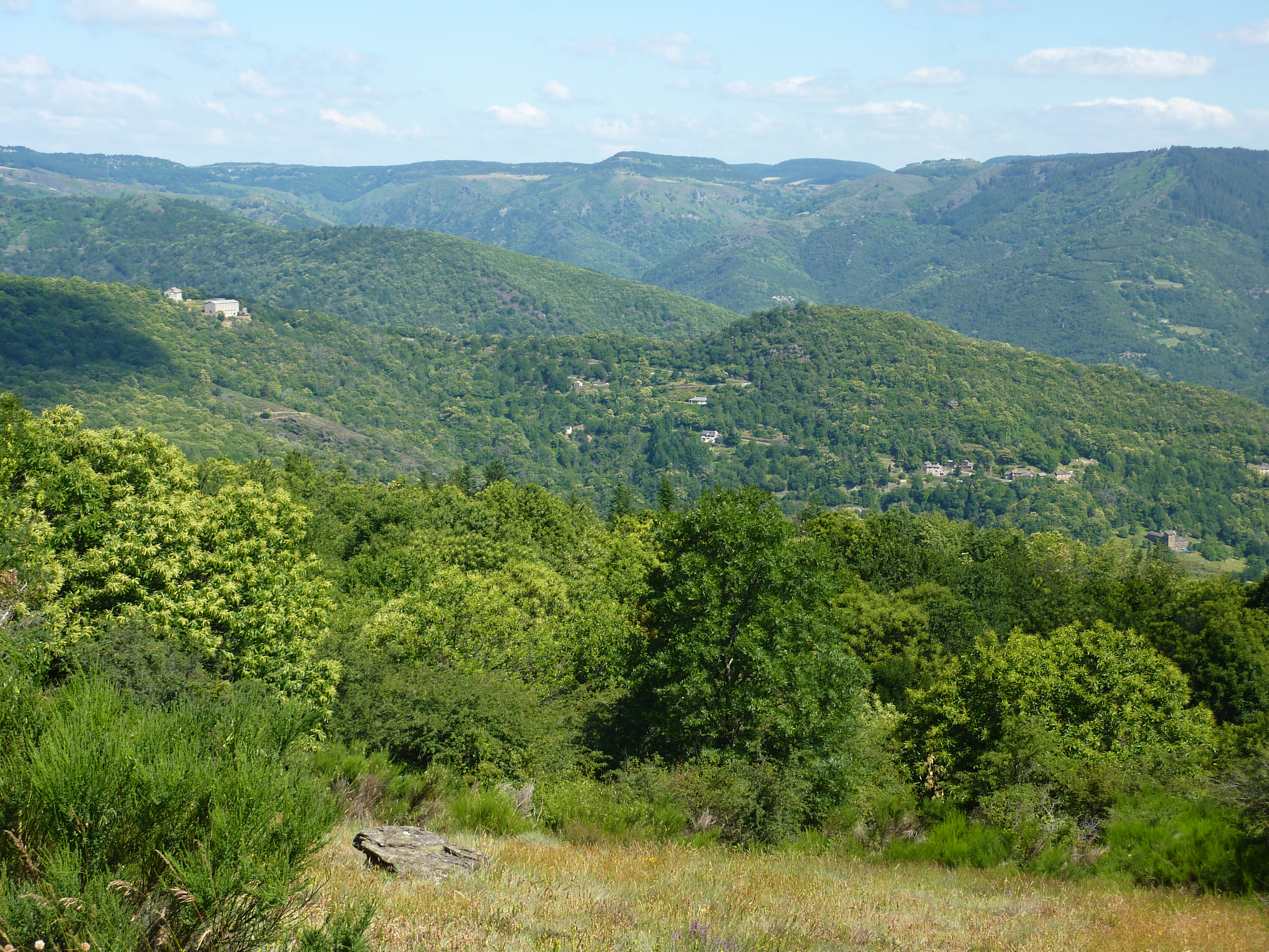 Cévennes: panorama entre Saint-Jean-du-Gard et Florac: la "vallée française"